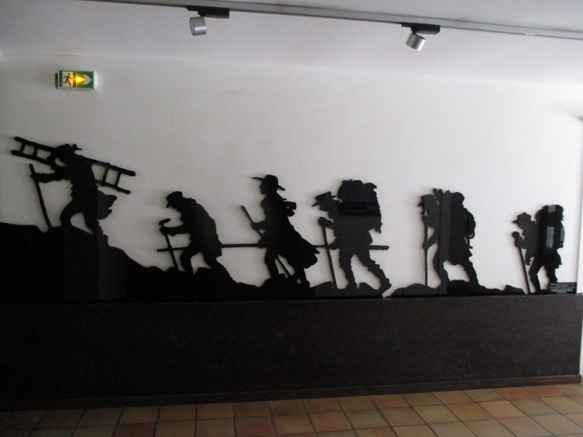 Maison de la montagne de Chamonix - Ancien presbytère de Chamonix-Mont-Blanc